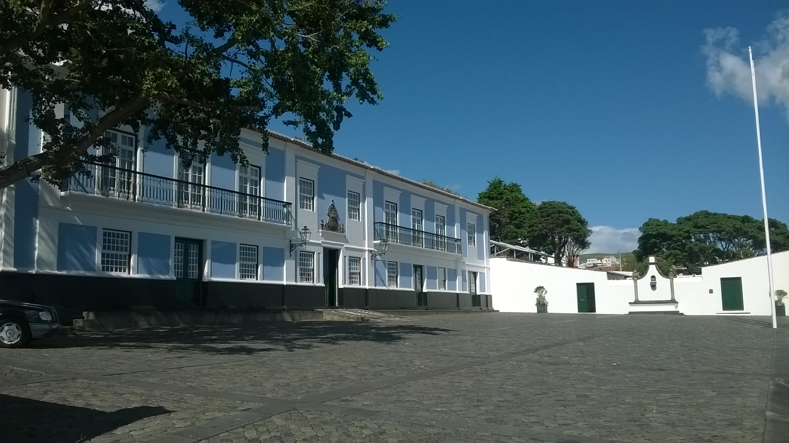 Solar da Madre de Deus, freguesia da Sé, concelho de Angra do Heroísmo, ilha Terceira, Açores, Portugal: vista do pátio.